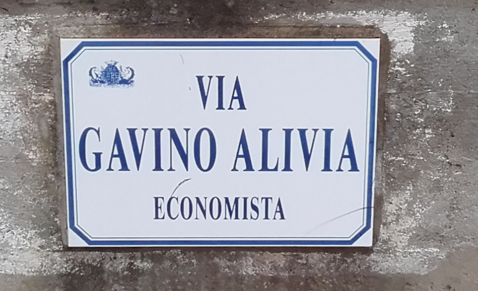 Targa di via Gavino Alivia a Sassari